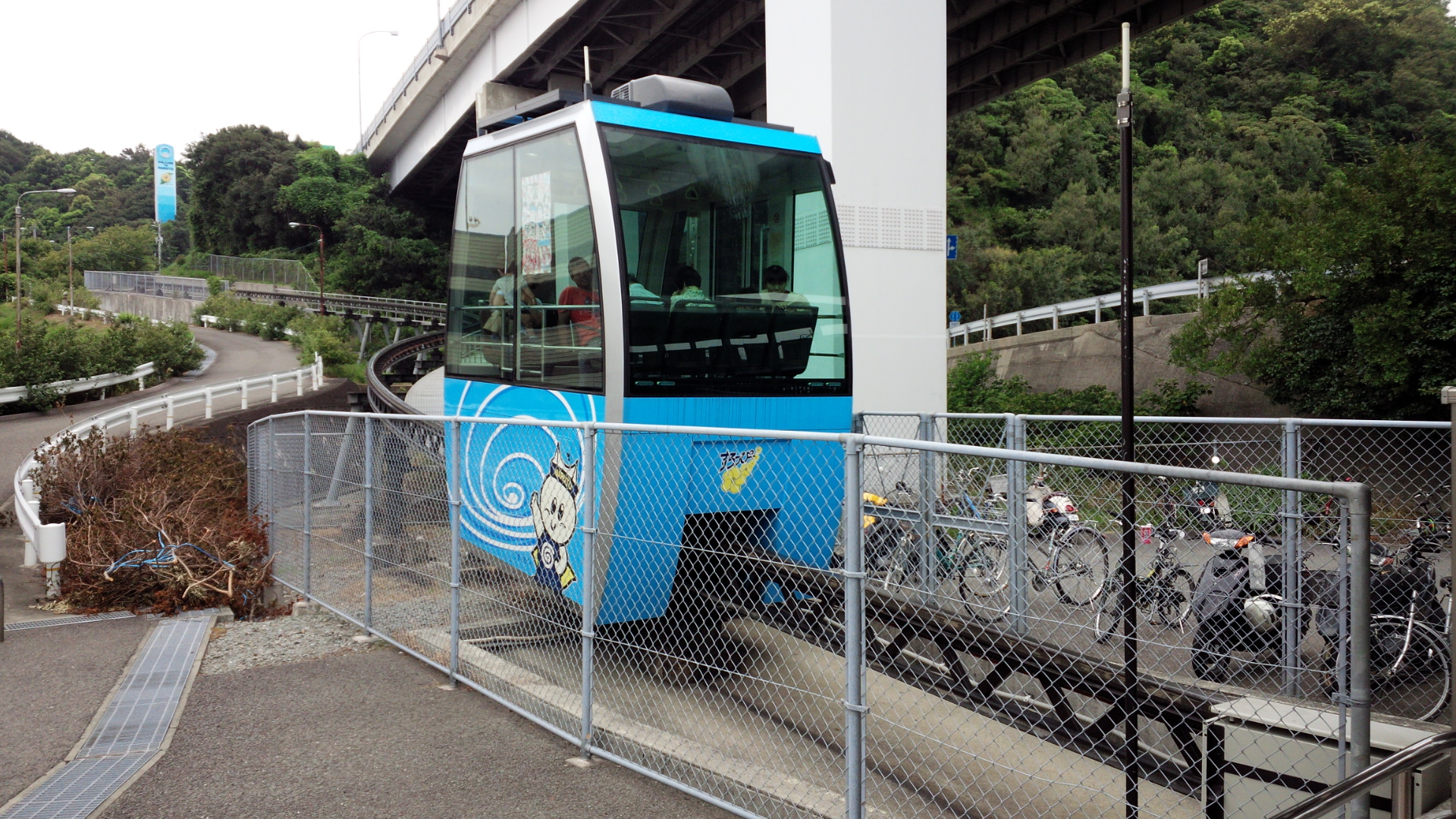 高速鳴門バス停の「すろっぴー」２代目